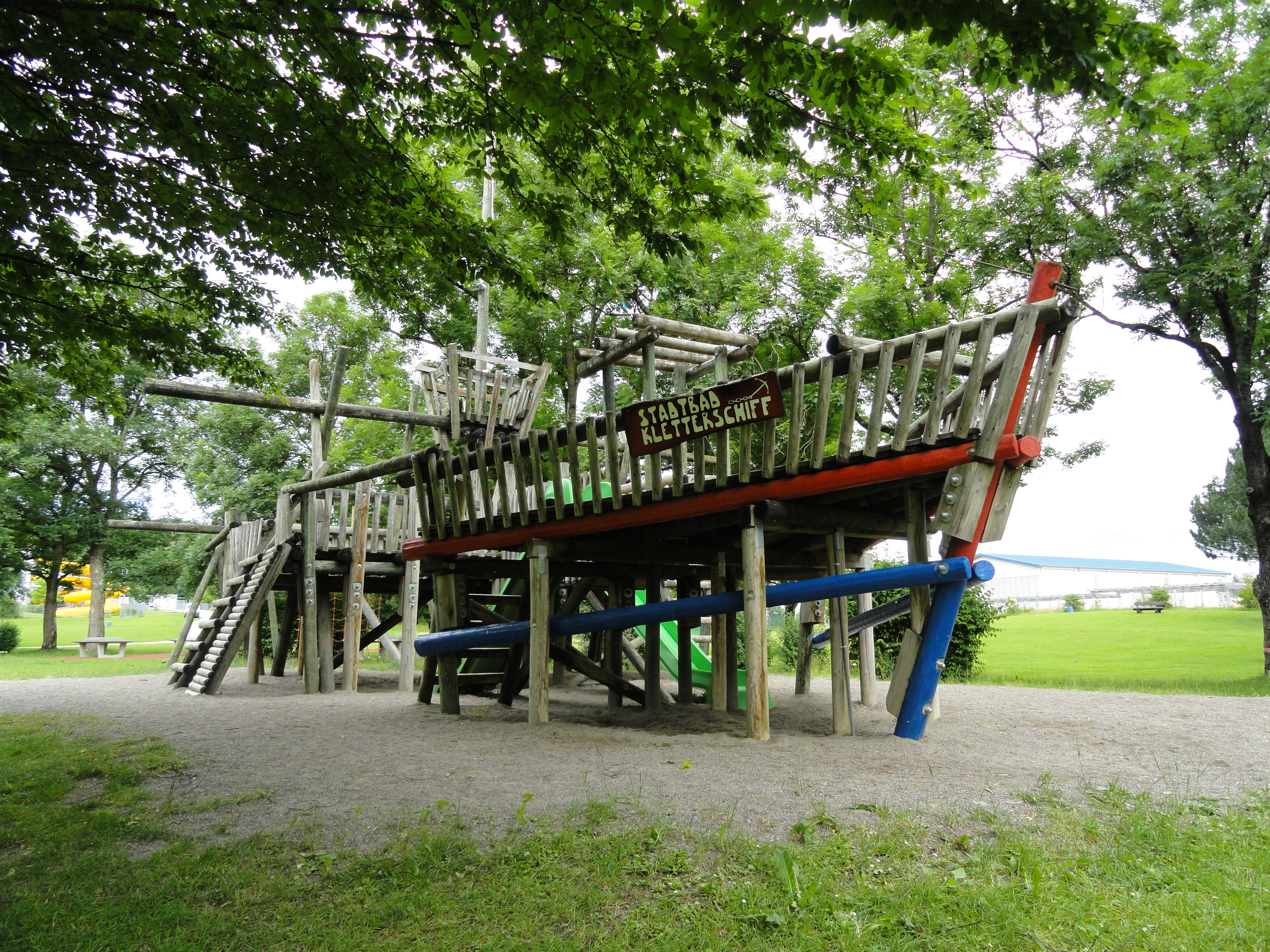 Cambomare, Kempten